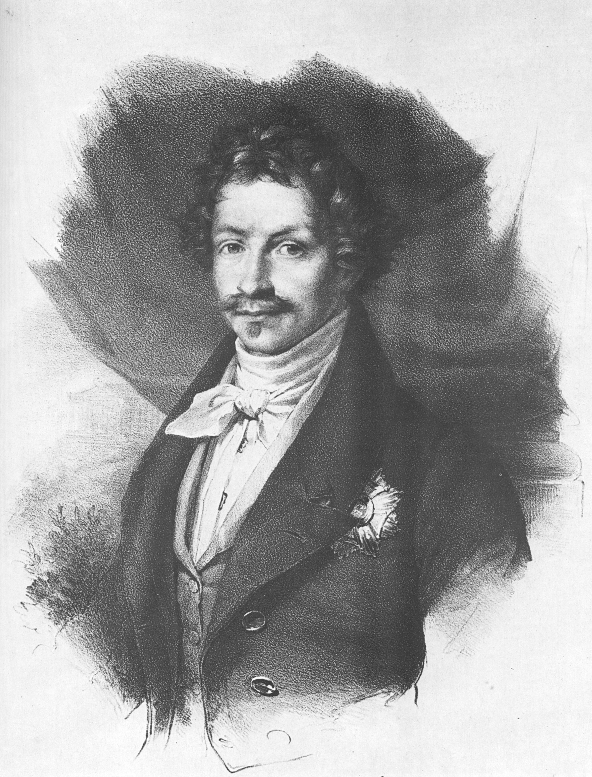 Ludwig I., König von Bayern (1786-1868), Lithography